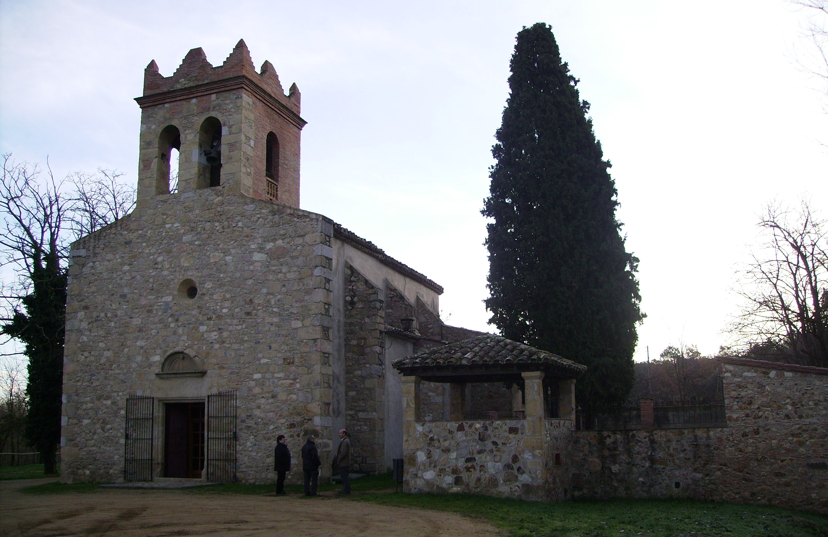 Església parroquial de Fogàs de La Selva dedicada a Sant Cebrià